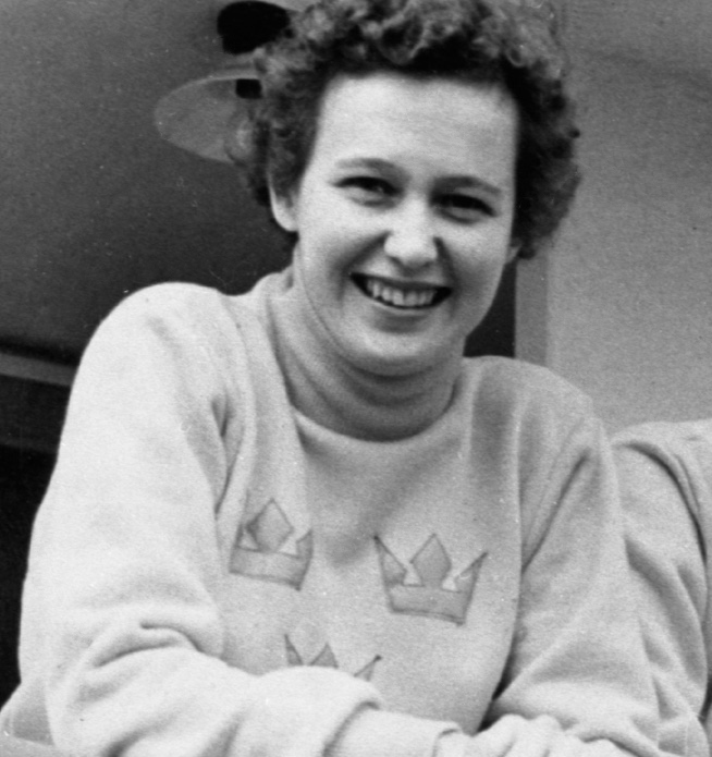 Anita Odell